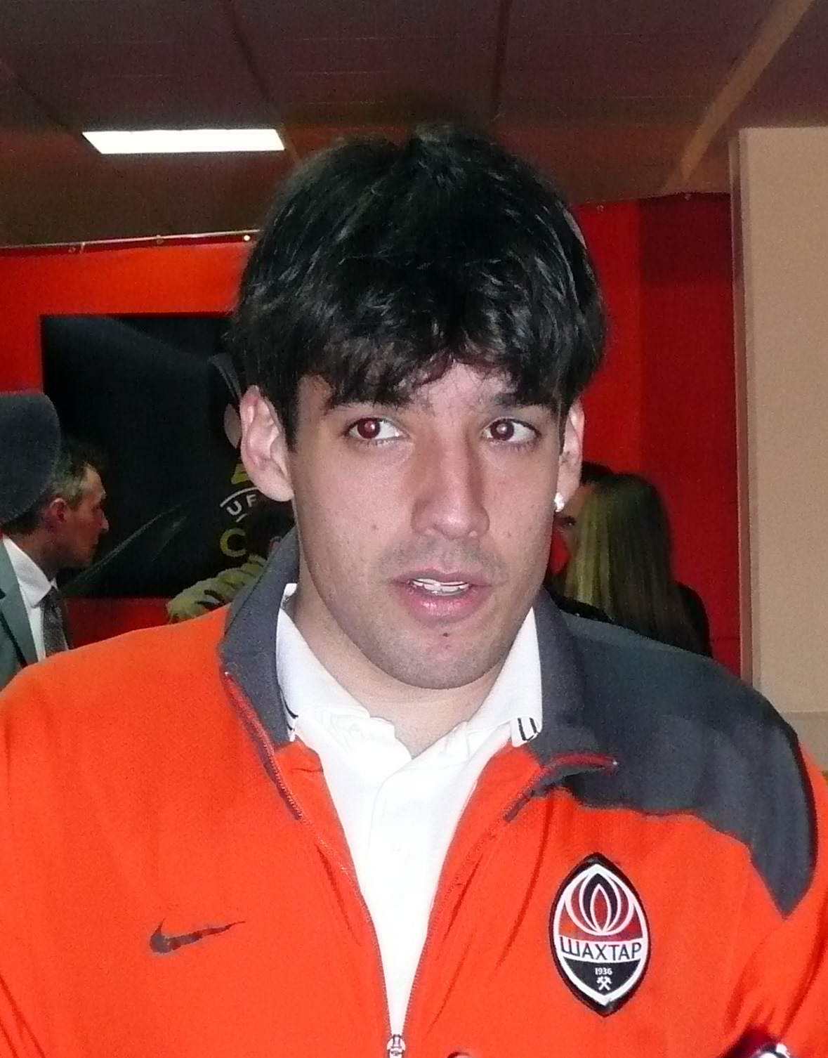 Футболіст ФК «Шахтар» (Донецьк) Ілсінью - автор вирішального голу у півфінальному матчі на Кубок УЄФА проти київського «Динамо» → This file has been extracted from another image: File:ILSINHO FC Shakhtar Donetsk.JPG.